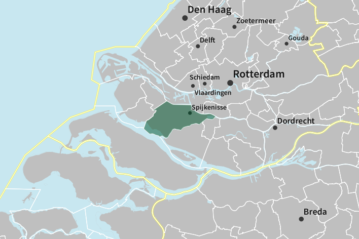 Indexkaartje van gemeente Nissewaard.